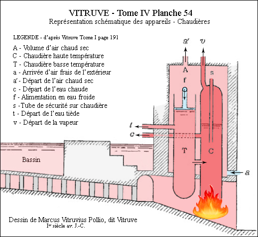 Vitruve. Tome I et IV - Schéma de production de chaleur.